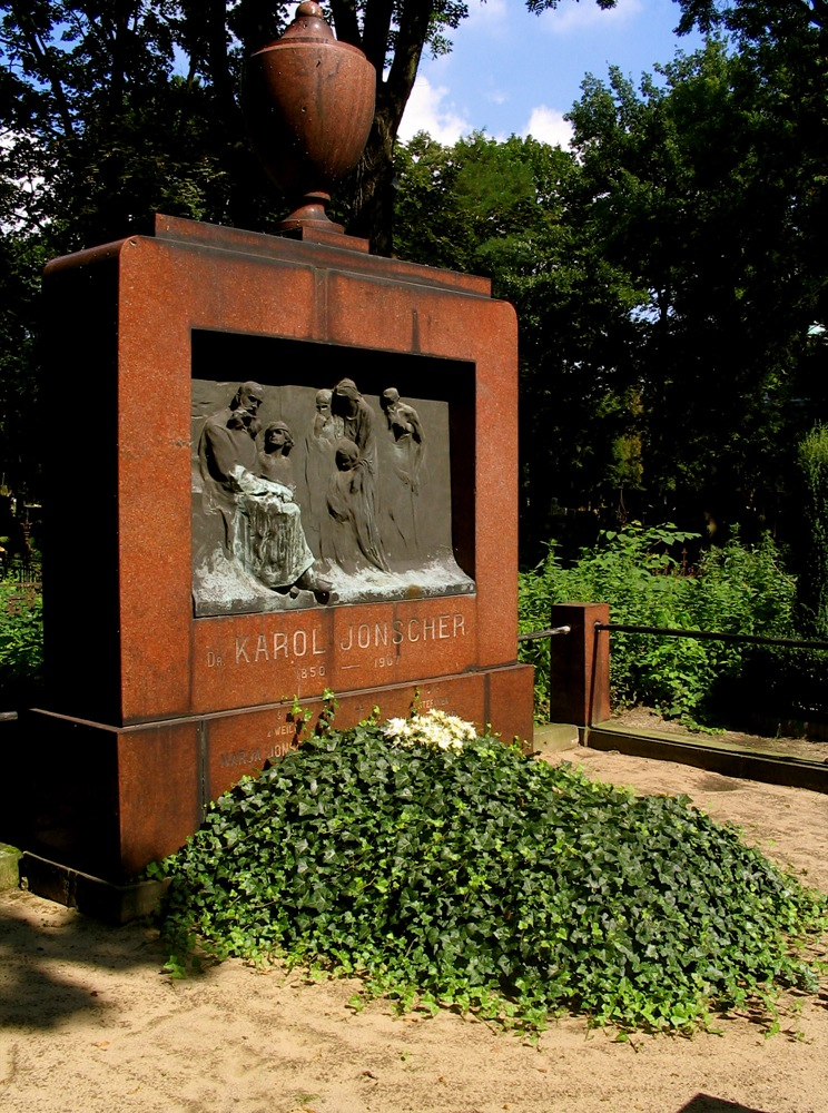 Grobowiec Karola Jonschera w Łodzi